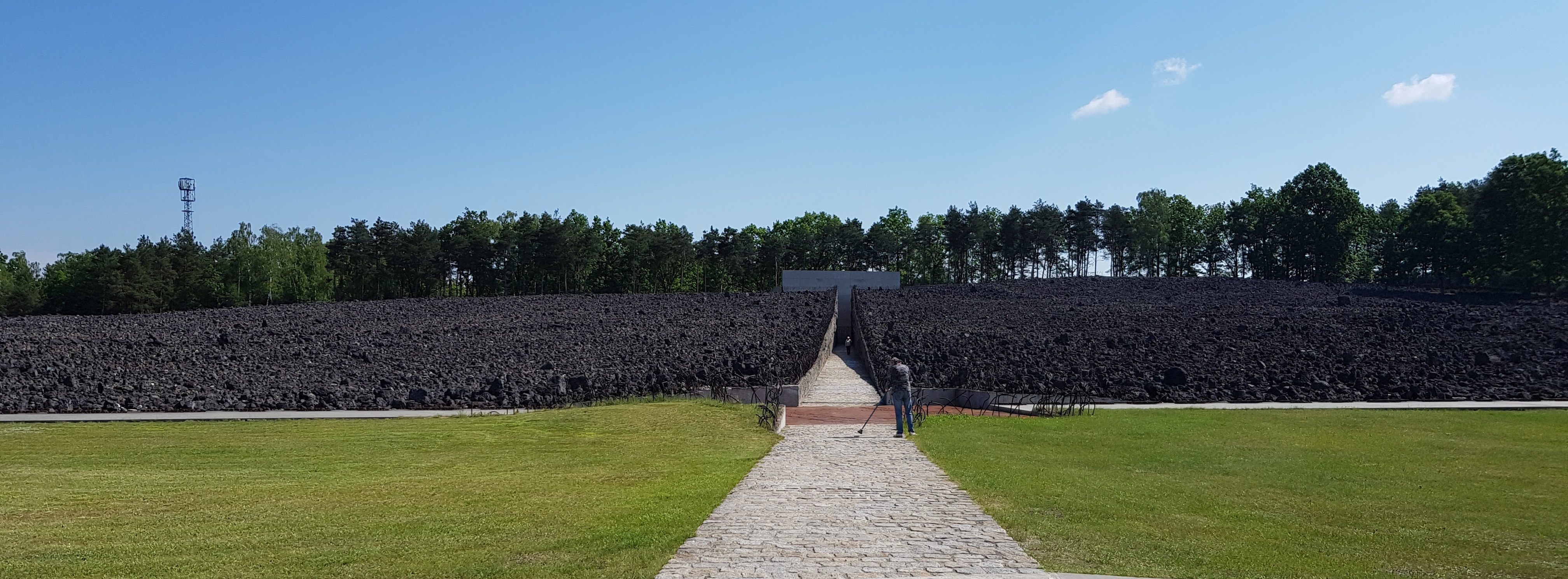 אתר קברי האחים בבלז'ץ